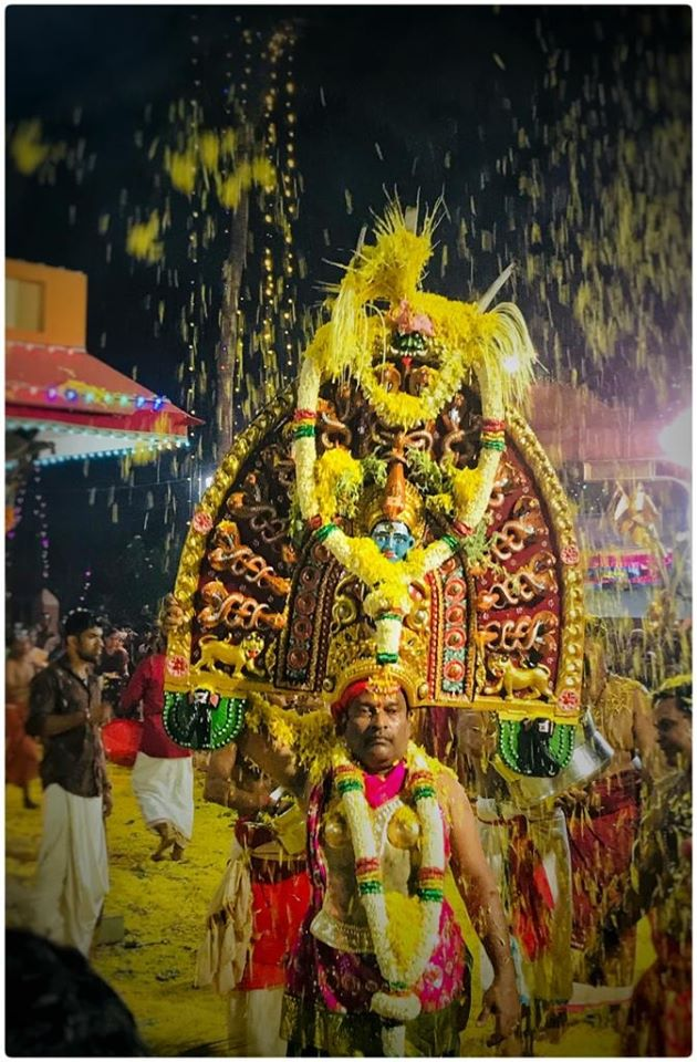 തിരുമുടി എഴുന്നള്ളത്ത്‌